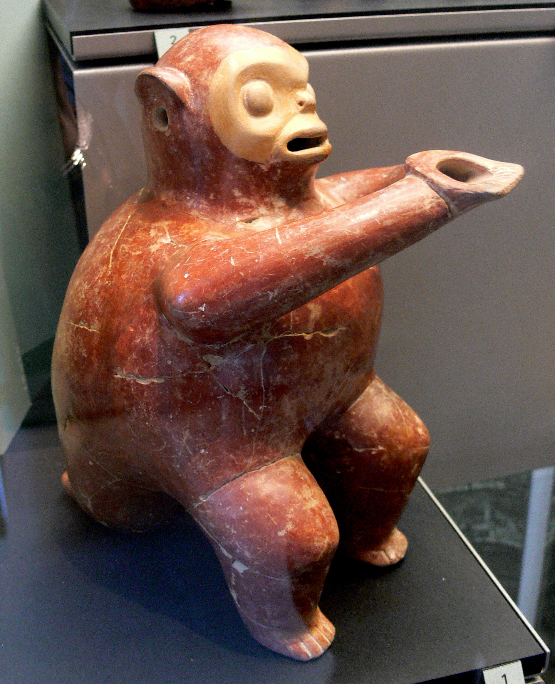 Schaffhausen, Museum zu Allerheiligen, Sammlung Ebnöther, (Abteilung "Idole") Affe in Opferhaltung, Keramik (bemalt, poliert), Höhe 23 cm, Ekuador. Chorrera, 1200–300 v. Chr. (Katalog 1999; S. 59)